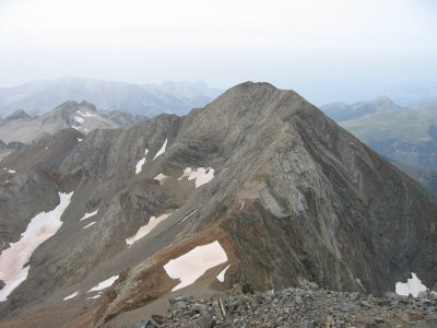 Pico Espadas visto desde el Pico Posets Esta imagen ha sido tomada personalmente por Avh